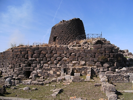 links Süd-Eingang zur Bastion Nuraghe Santa